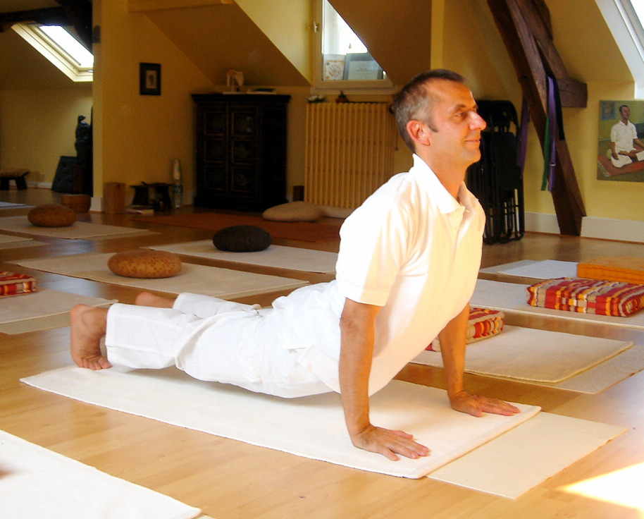 Yoga postures